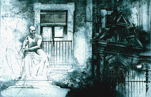 Grabado estampado de publicación José Antonio Sánchez Baillo